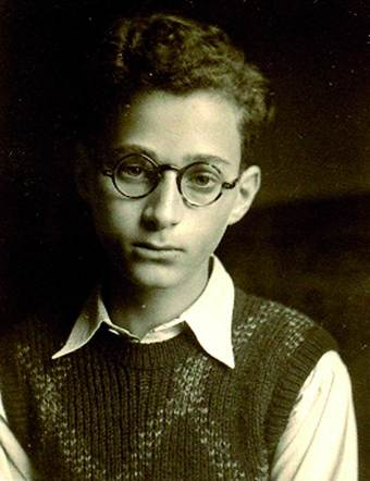 Einer der 14 deportierten und ermordeten jüdischen Schülerinnen und Schüler der Quäkerschule Eerde.